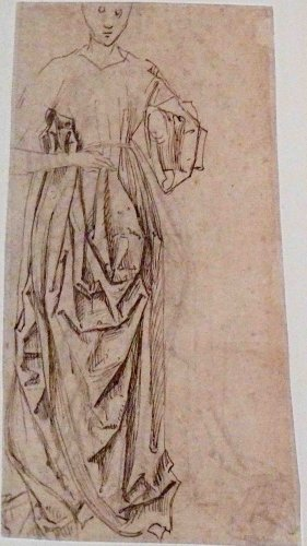 Plume et encre brune - 23,2 x 13,1 cm Colmar, Musée Unterlinden Photo : Didier Rykner